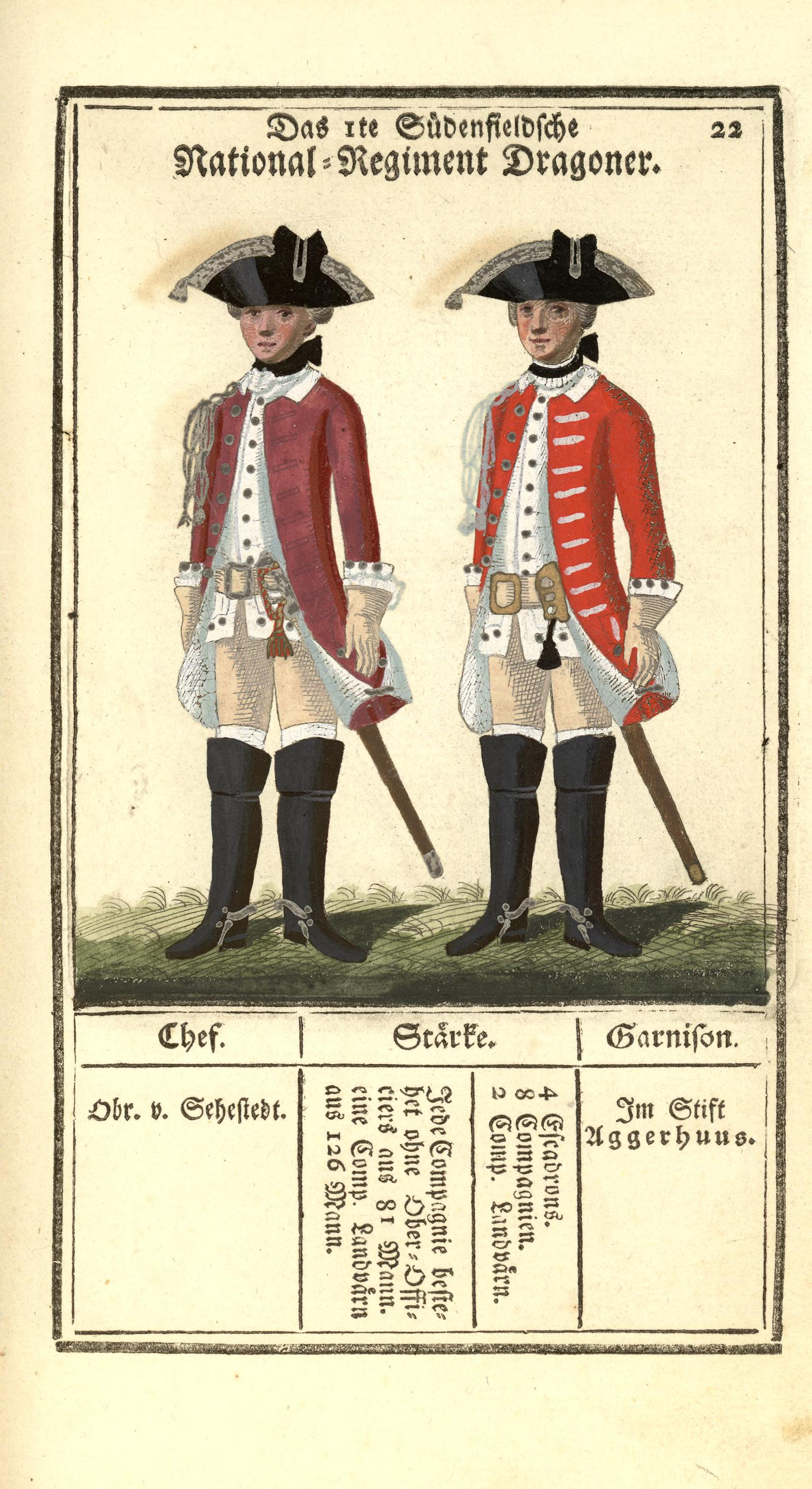 Illustrasjon hentet fra boken "Vorstellung der sämtlichen Königl. Dänischen Armee" av Bertram, Carl og utgitt av Carl Bertram (dk, 1763)